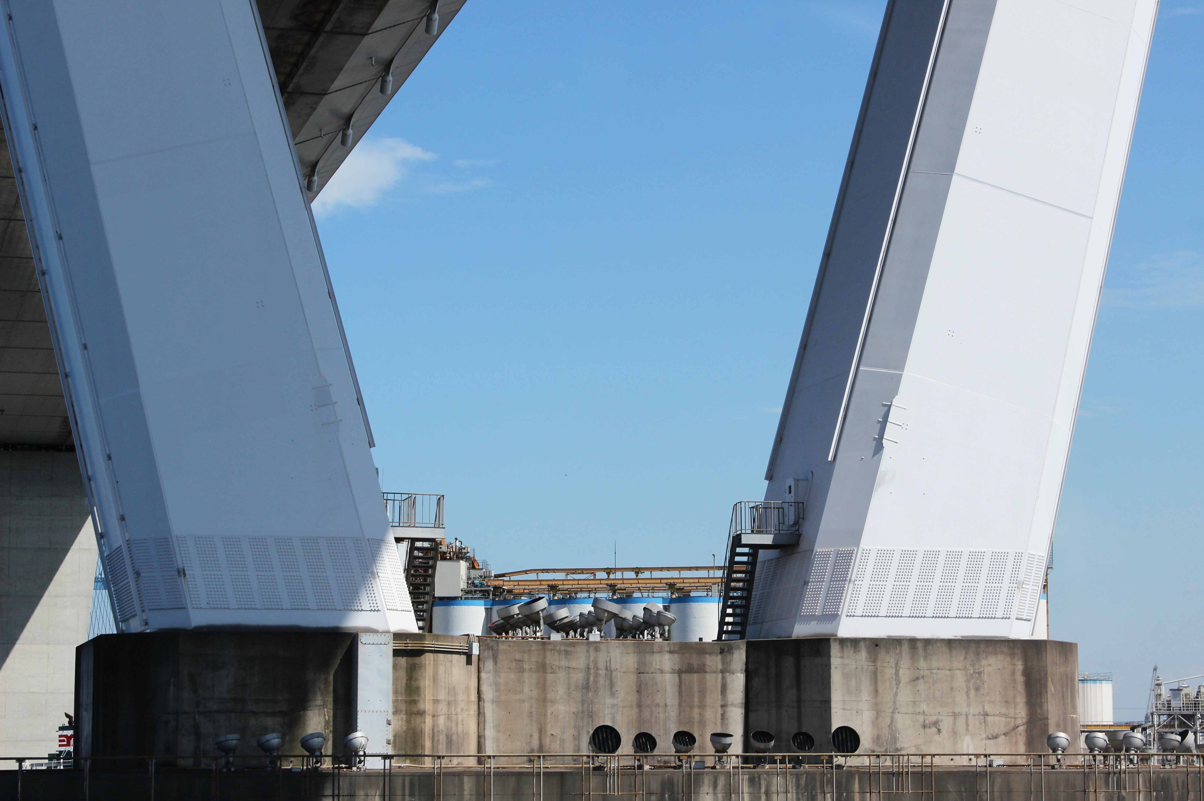 名港中央大橋の基部。水上バスから撮影。